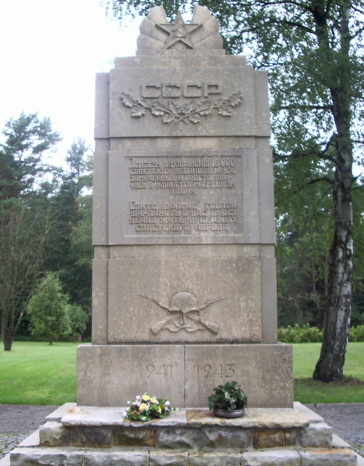 Mahnmal an die mehr als 16.000 Rotarmisten die durch Hunger, Kälte, Misshandlungen und Krankheiten im Kriegsgefangenenlager Stalag XD 310 ums Leben kamen.